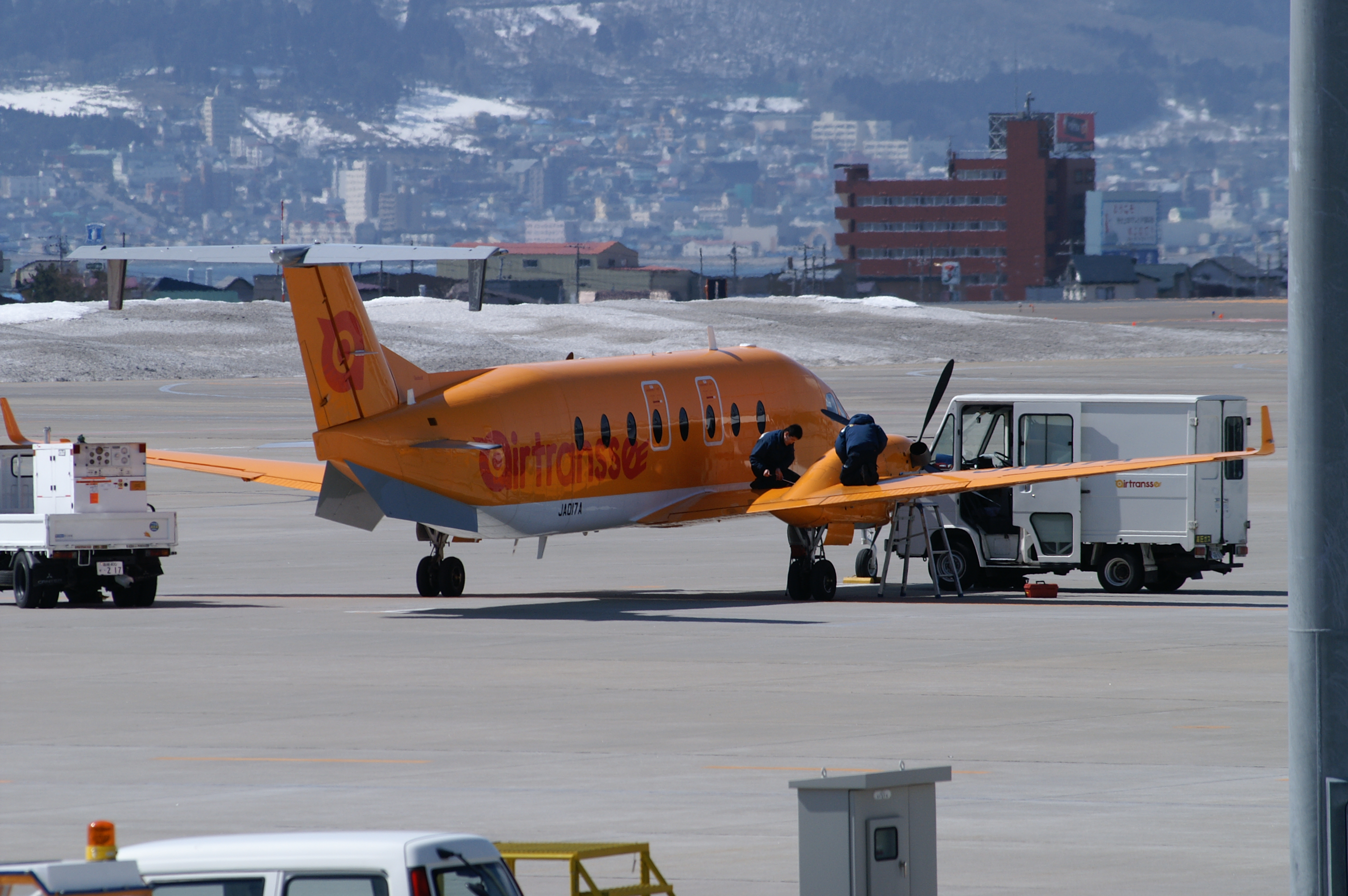 airtransse (--/TSQ) Beech1900D (JA017A) / エアトランセ（--/TSQ）の Beech1900D 2号機（JA017A）。 (2006/03/21 Hakodate Airport, Hakodate, Hokkaido, JAPAN)